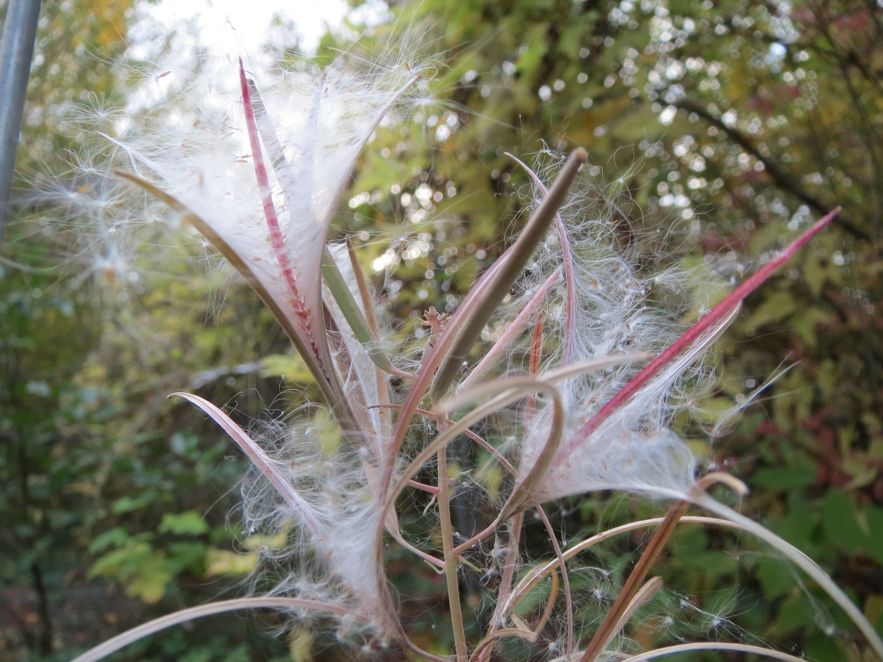 Schmalblättriges Weidenröschen (Chamerion angustifolium) in Hockenheim